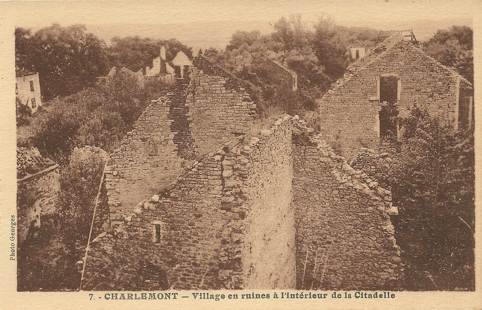 Givet (Ardennes, France) - le fort de Charlemont : le village de Charlemont en ruines à l'intérieur de la citadelle (suite au bombardement d'août 1914)